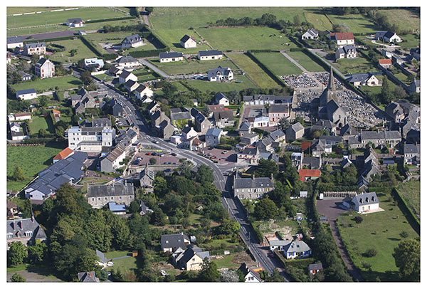 Village de Blainville-sur-Mer